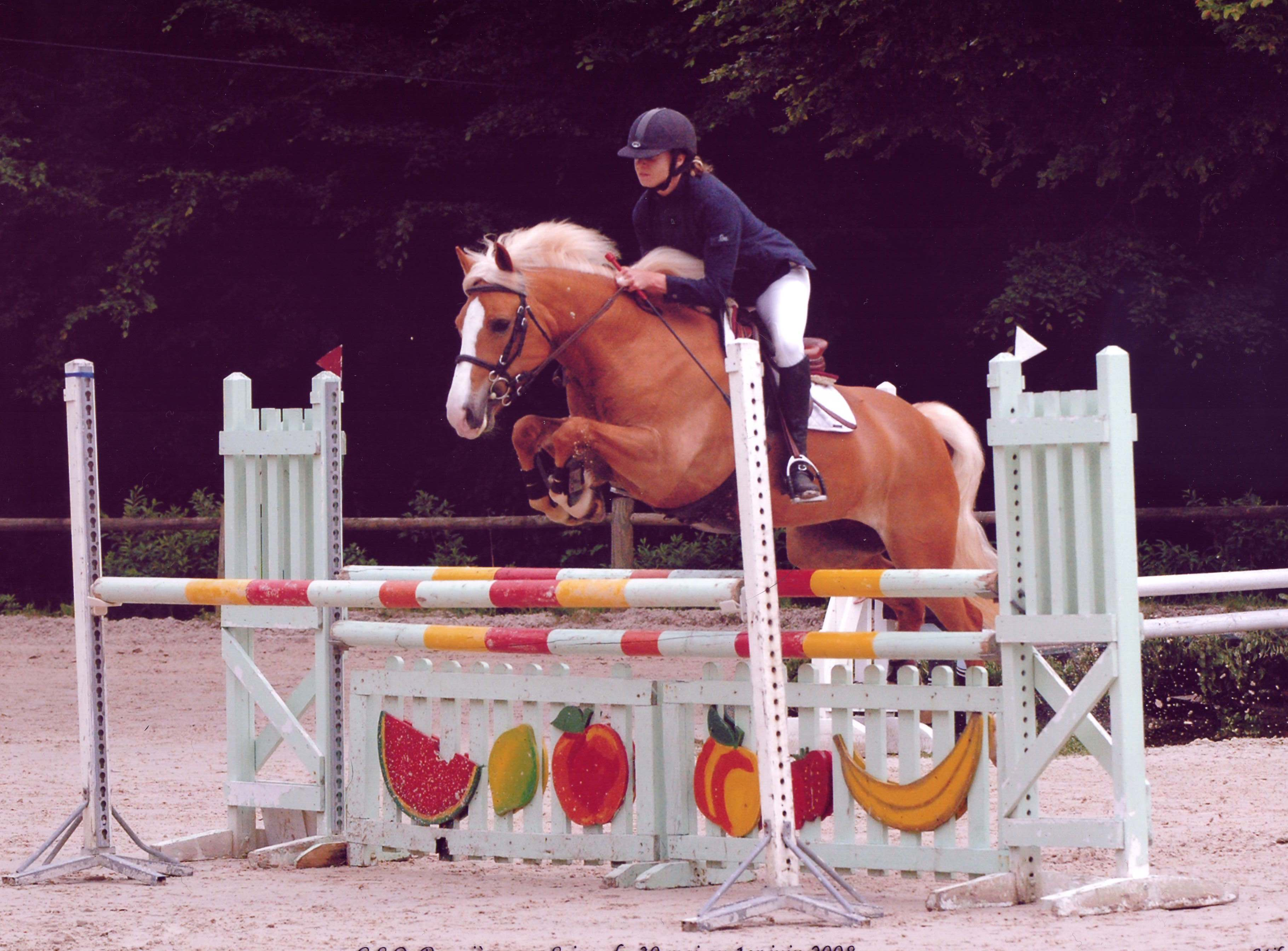 olga lady, haflinger 6 ans en cso